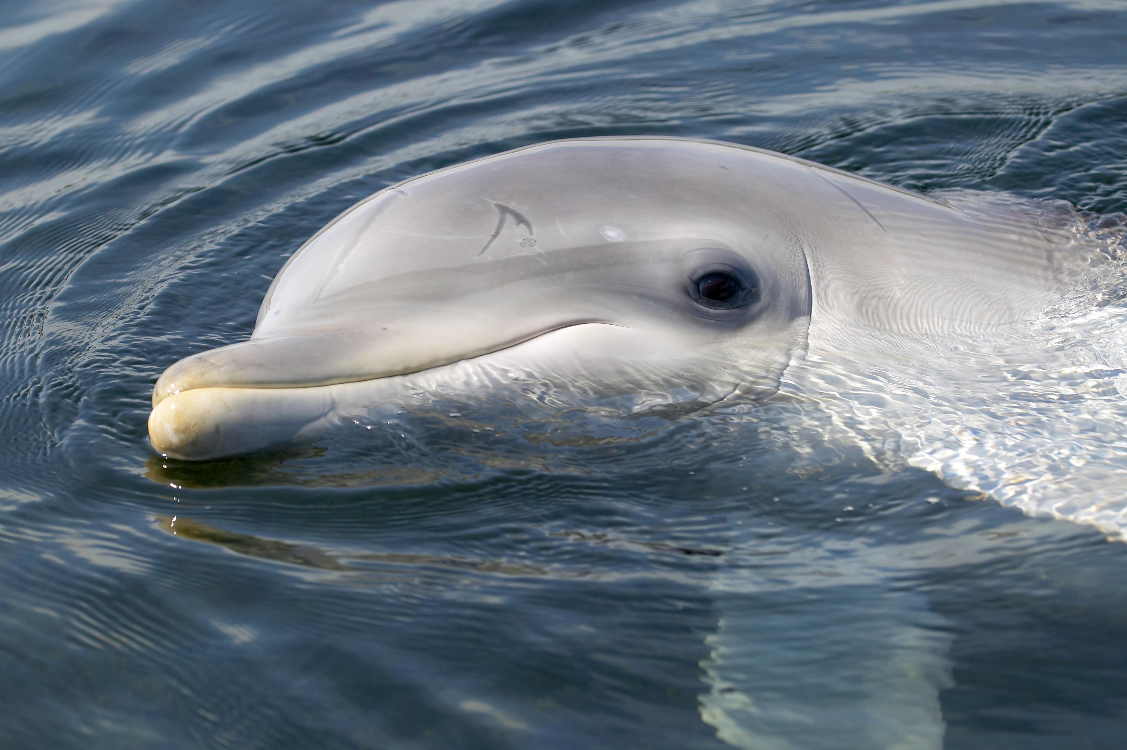 Dolfinarium